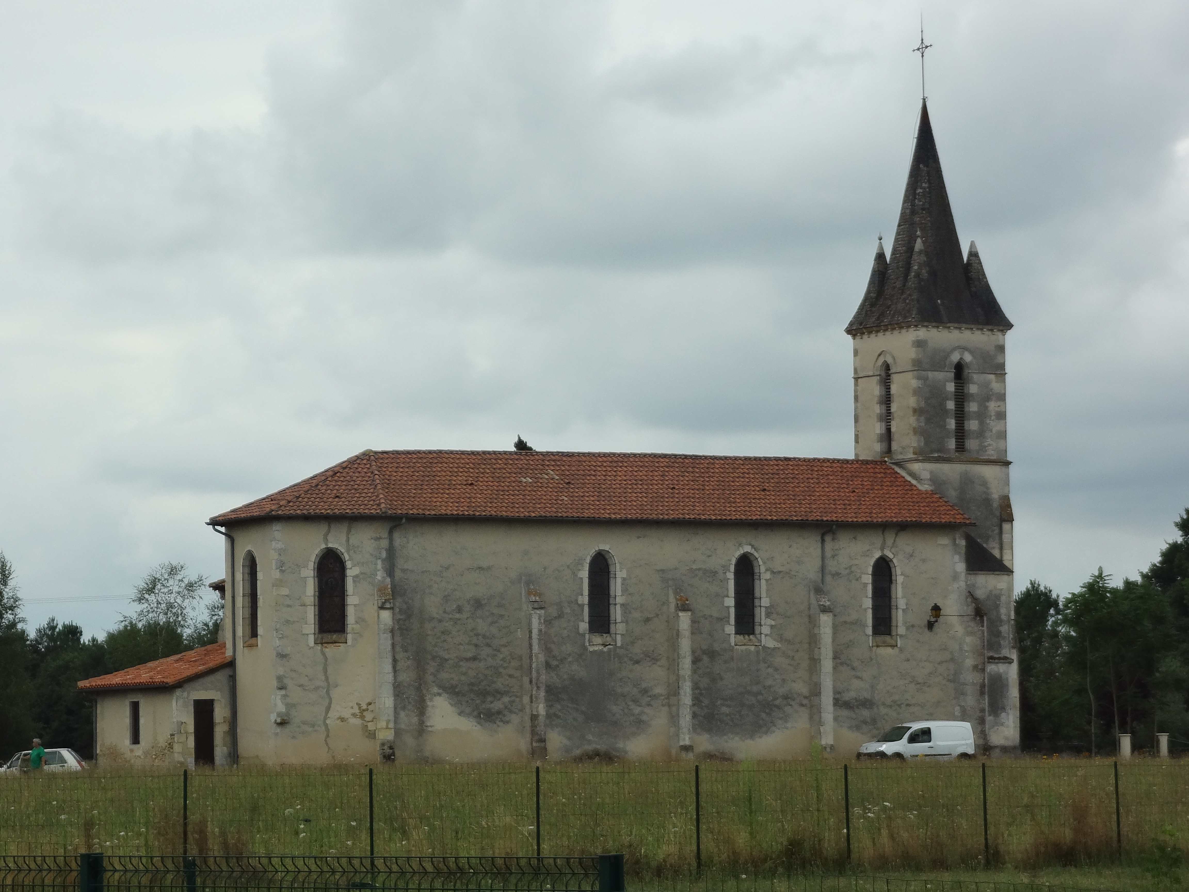 Église de Pouydesseaux, mur nord